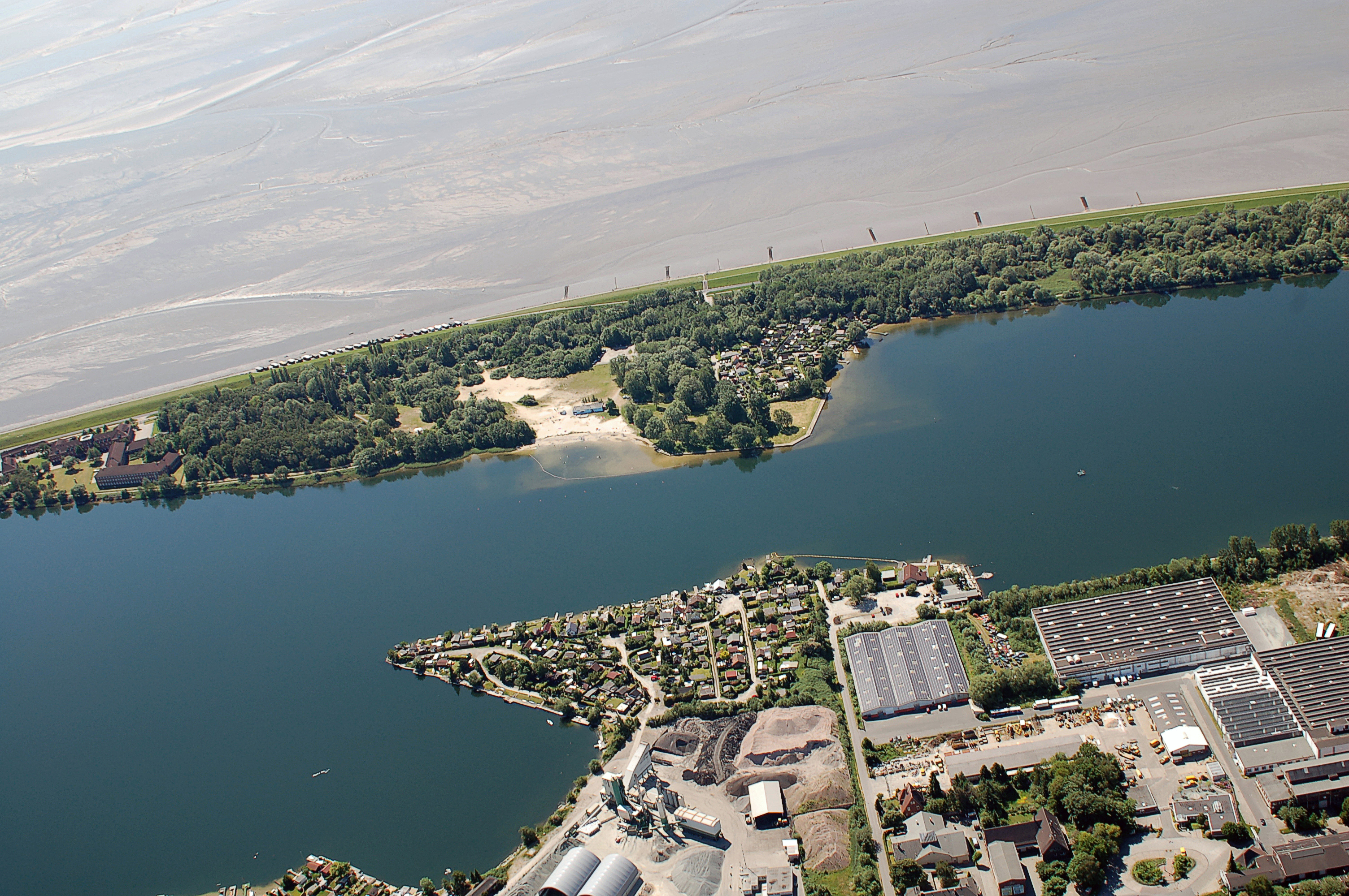 Luftbilder von der Nordseeküste 2012-05